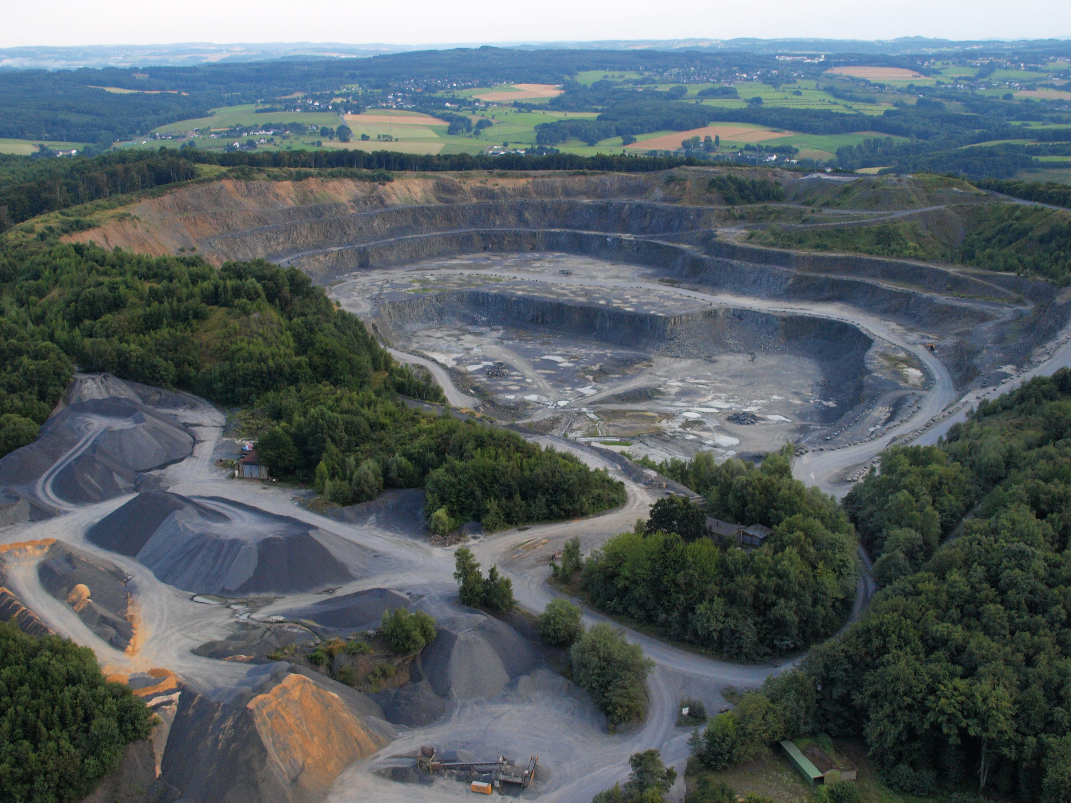 Der Basaltsteinbruch Hühnerberg, in dem heute noch Abbau stattfindet